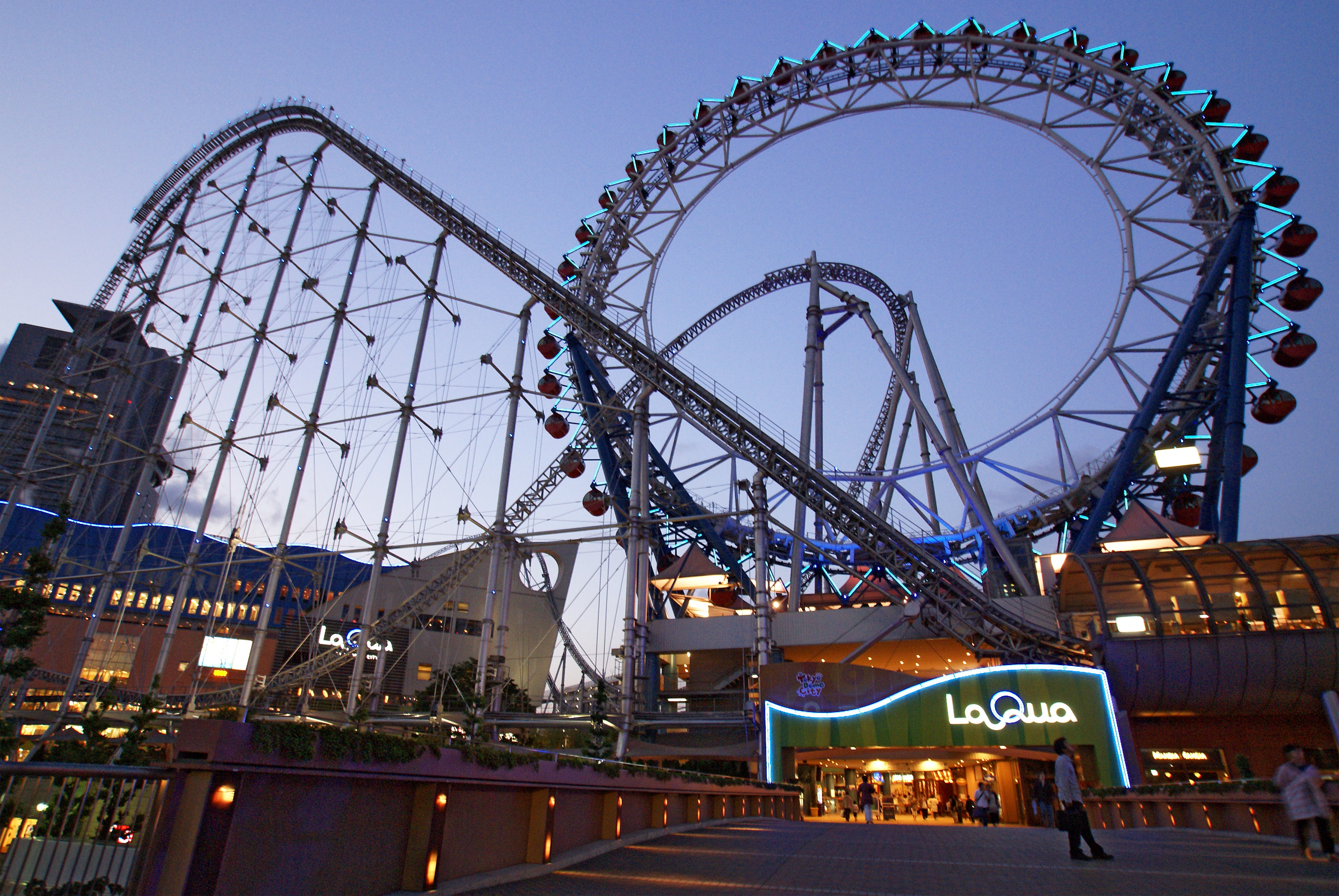 LaQua in Bunkyo-ku, Tokyo, Japan